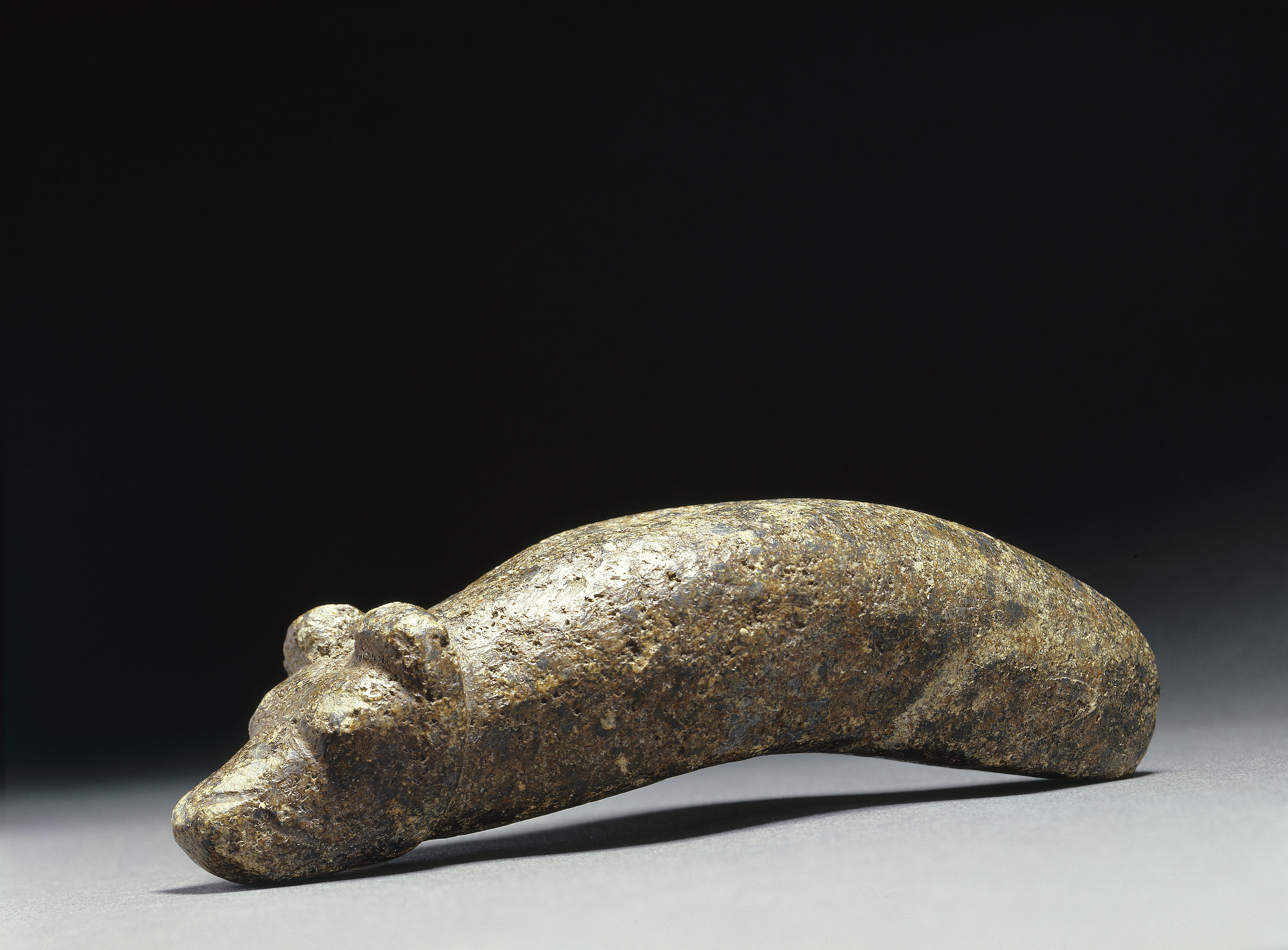 Paltamosta löytynyt kivikautinen karhunpäänuija